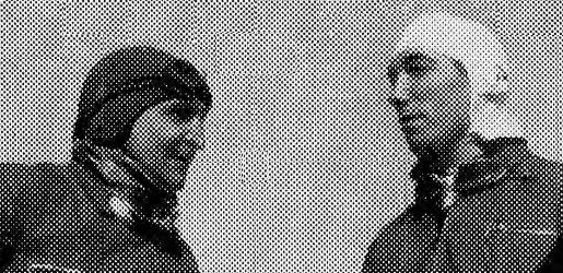 Charles de Cortanze (G) et Marcel Contet (D) aux 24 Heures du Mans 1938.